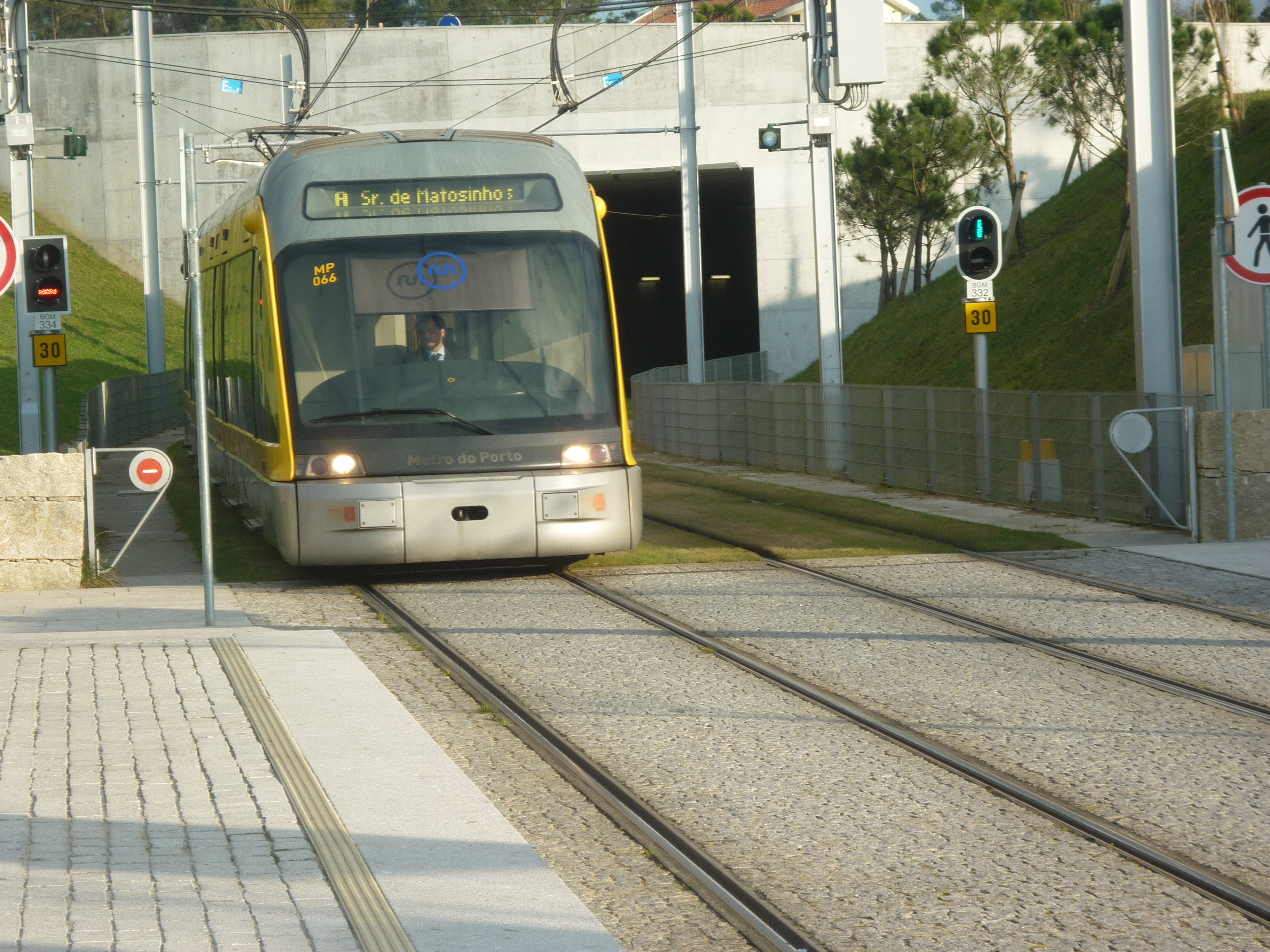 Metro do Porto a chegar a Baguim. Nota: Embora a composição indique linha "A - Sr. de Matosinhos", o facto é que alguns veículos desta linha tem seguimento até Fânzeres (linha D).